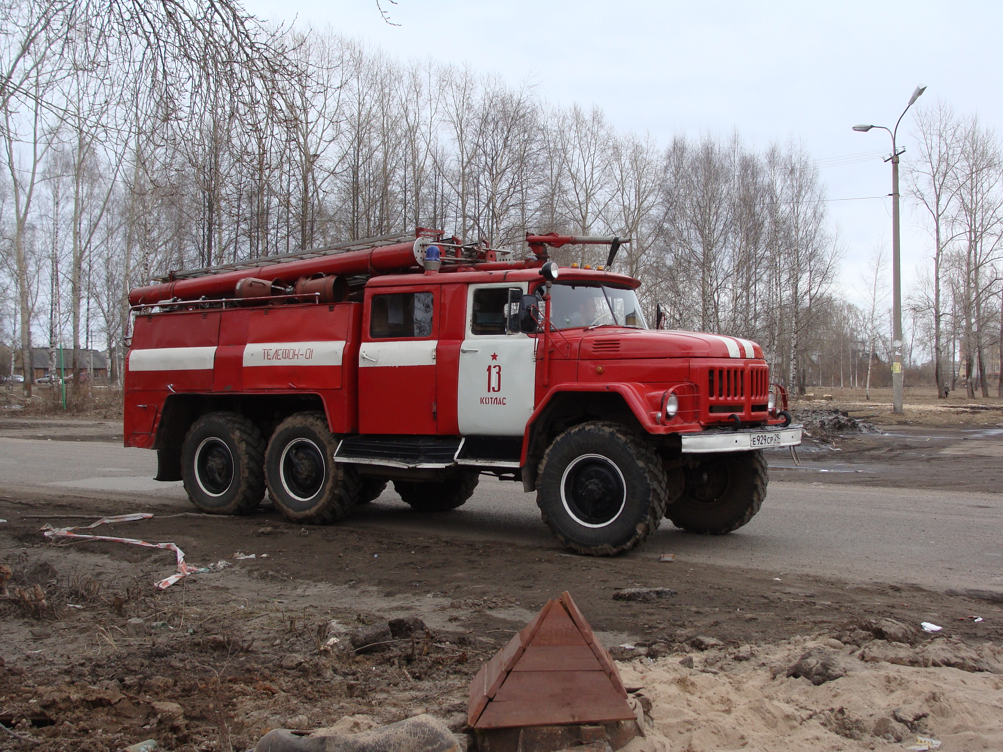 Автомобильная цистерна (ЗИЛ-131) ПЧ-13 г.Котлас.